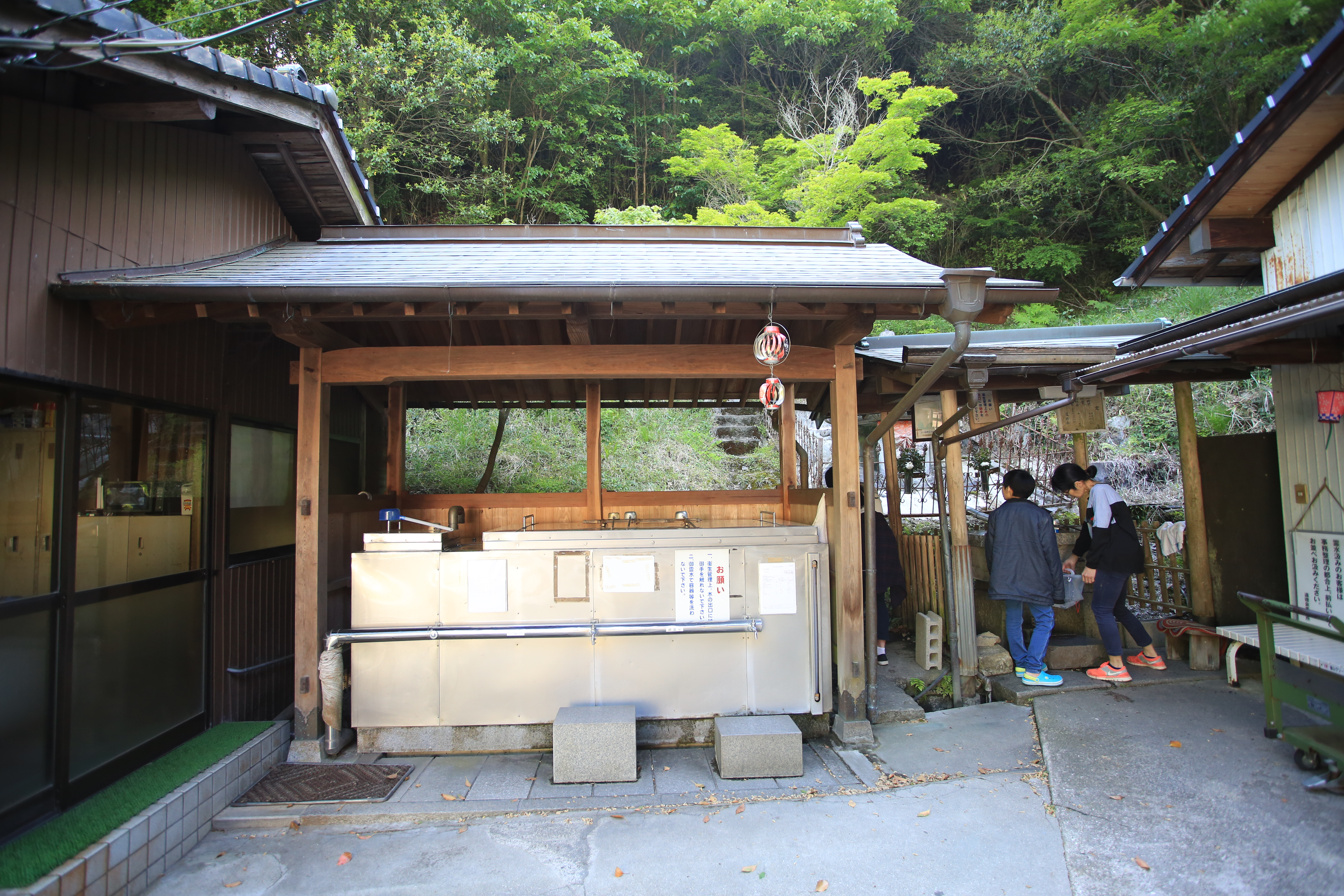 広島県福山市津之郷にある俄山弘法大師堂の水汲み場